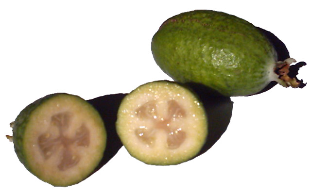 Two Feijoas, one is cut in half.